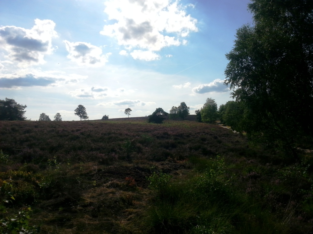 Brunsberg in der Lüneburger Heide